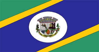 Bandeira de Cacaulândia, Rondônia, Brasil